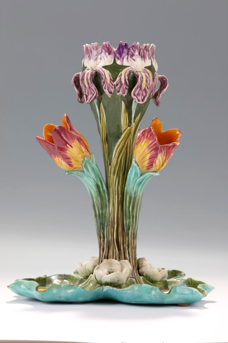 Centre de table 3 tulipes n°38, Faïence d'Onnaing, France XIXe siècle